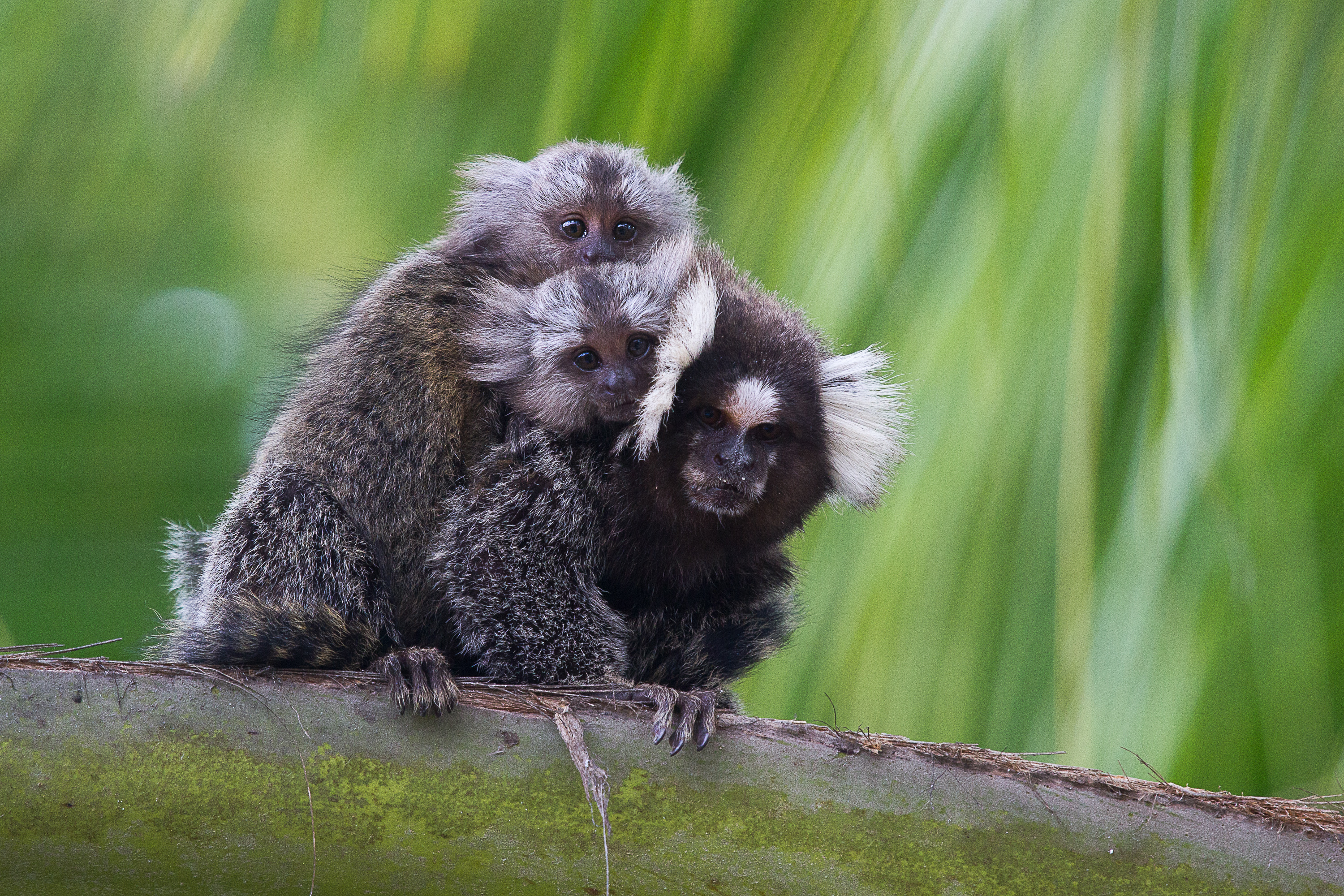 Mãe Sagui-de-tufos-brancos carregando seus dois filhotes nas costas